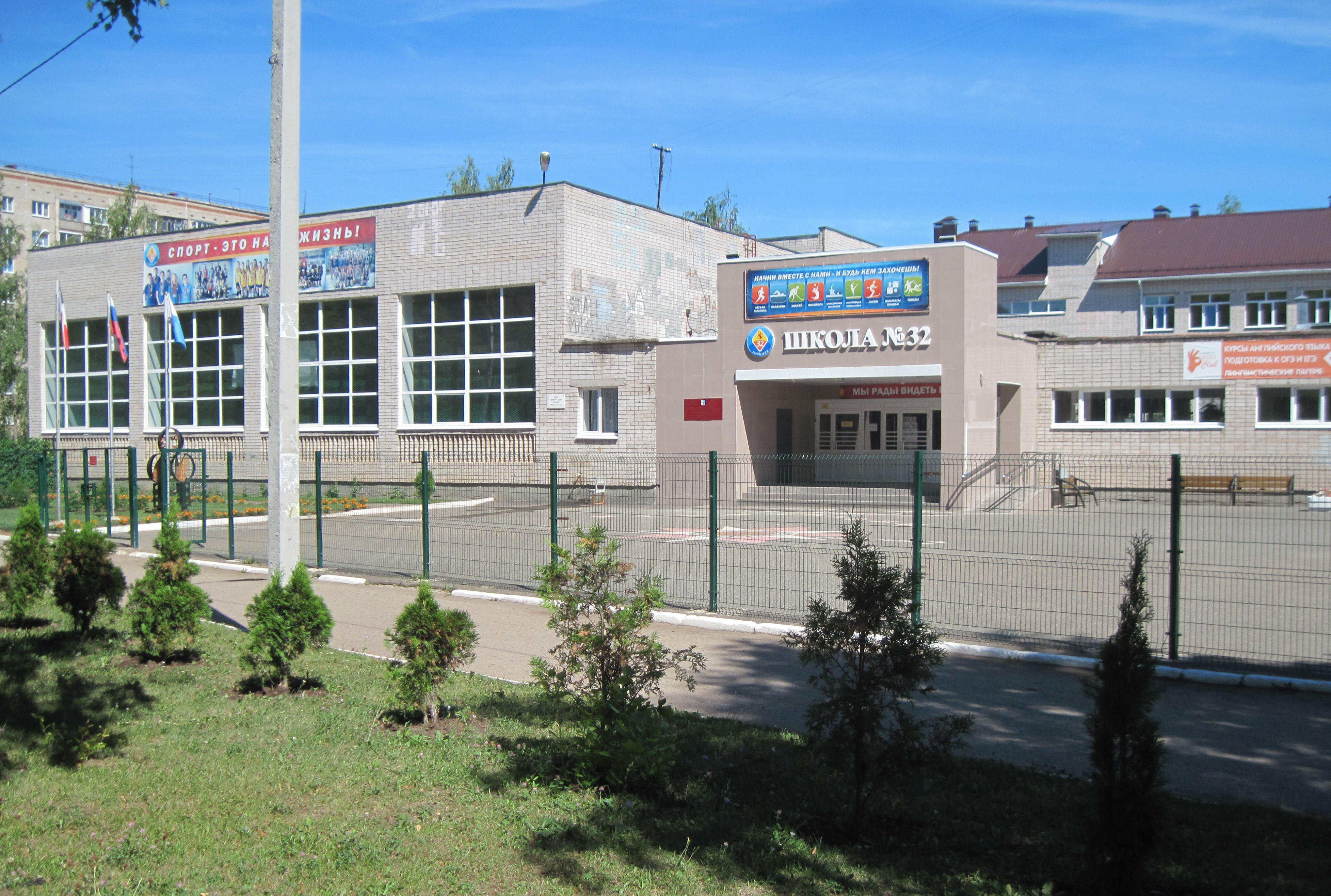 Город Ижевск,улица Молодёжная,26.